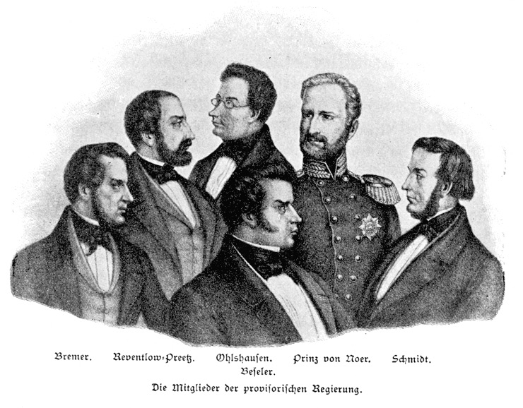 Das Bild zeigt die 6 Minister der provisorischen Regierung von Schleswig-Holstein 1848